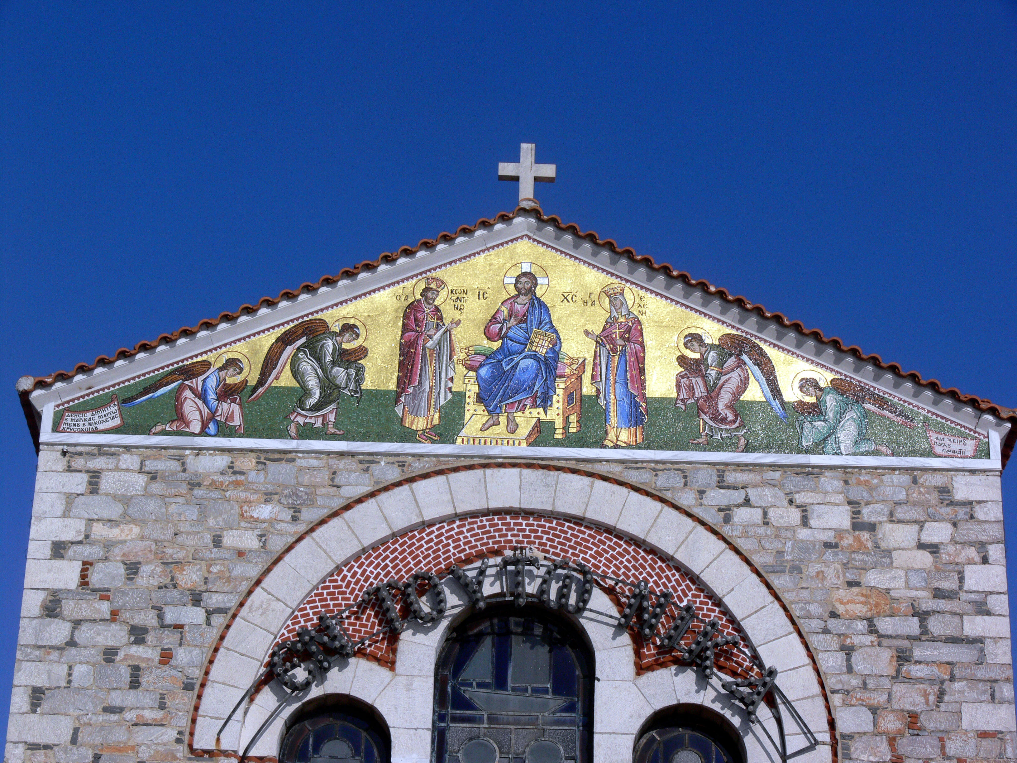 Volos. Basilika